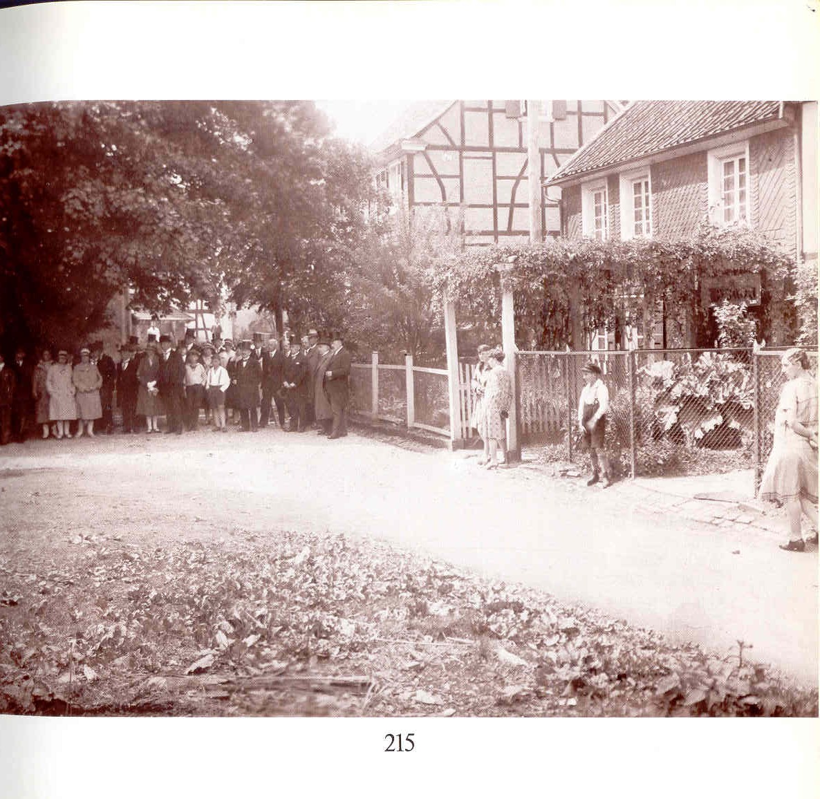 Birthplace of Wilhelm Idel from the book Wiehl im Wandel der Zeiten - Geburtshaus von Wilhelm Idel aus dem Buch Wiehl im Wandel der Zeiten Author mrfinch Time of creation 09 jan. 2007 Licence GNU FDL and CC-by-SA Scan Wiehl im Wandel der Zeiten von 1977